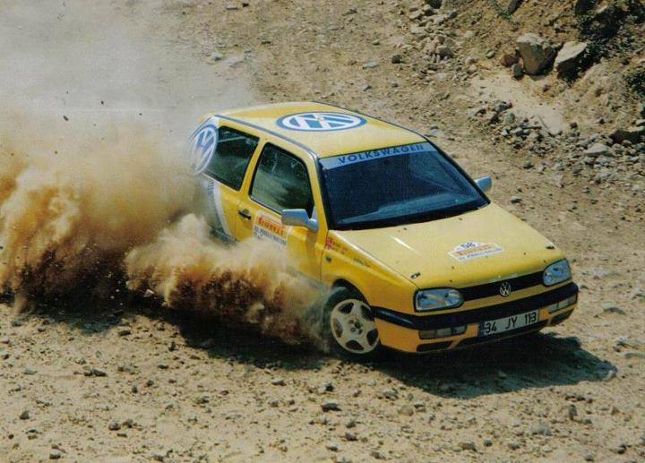 Engin Apaydın tarafından kullanılan Golf marka bir ralli aracı.